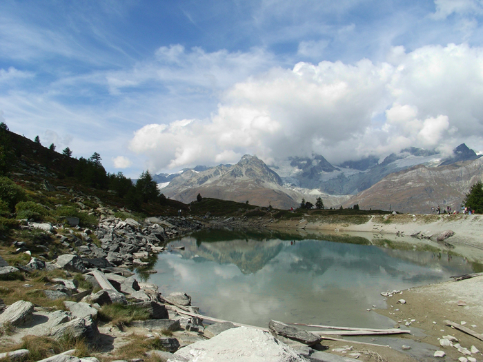 Bergsee bei Zermatt auf 2300 m ü. M.